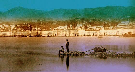 Palazzata